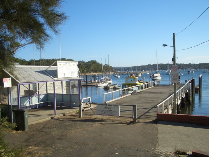 Cronulla Ferry Wharf